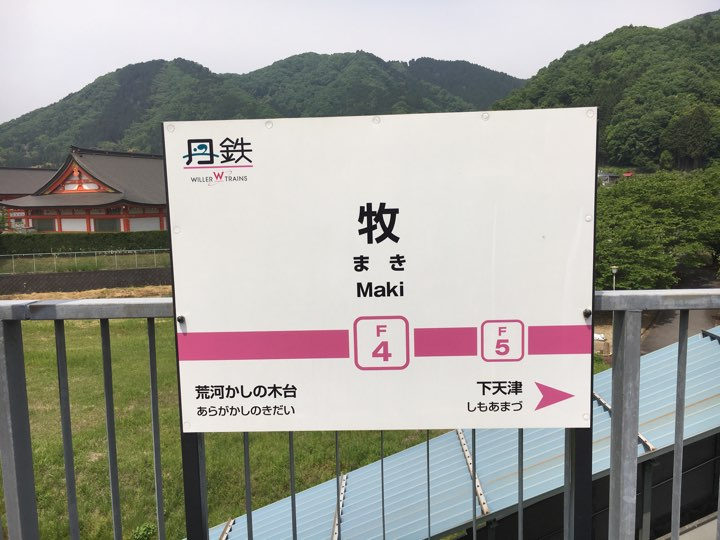 2017年5月12日撮影。1番線ホーム側から撮影。